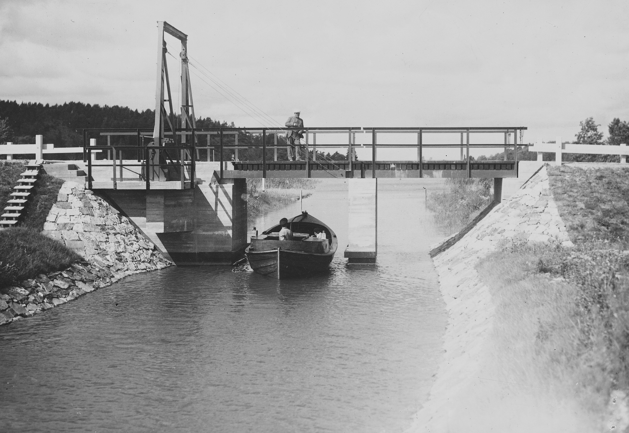 Muskö kanal är färdigbyggd